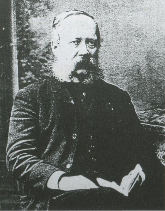 Victor Kullberg, svensk urmakare